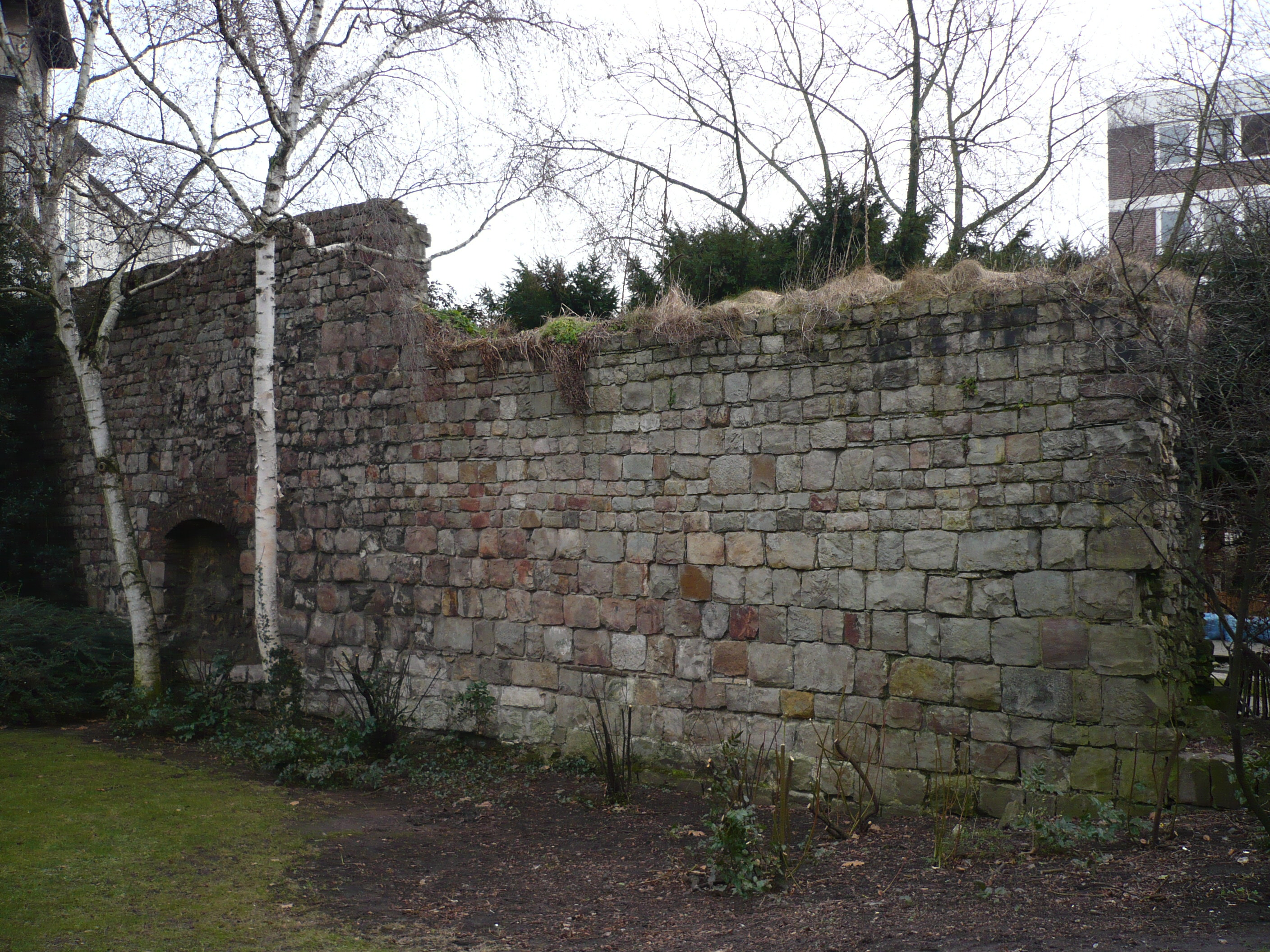 Teil der ersten Stadtmauer in Aachen "Barbarossamauer", Pontstraße/Templergraben